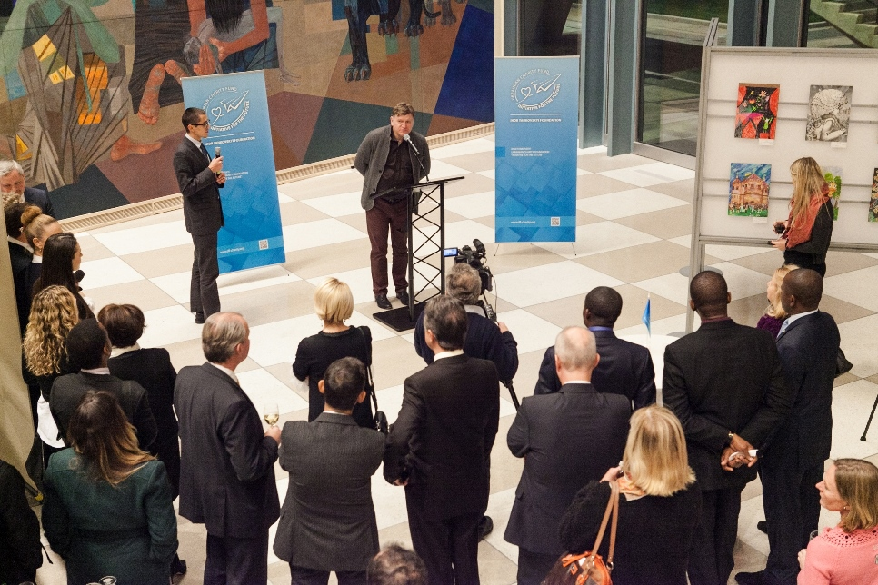 Евгений Карась на открытии выставки детского рисунка в Штаб-квартире ООН, Нью-Йорк, 2015